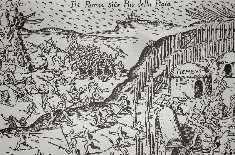 Destrucción del fuerte Sancti Spiritu. Ilustración del libro Viaje al Río de la Plata de Ulrico Schmidl.